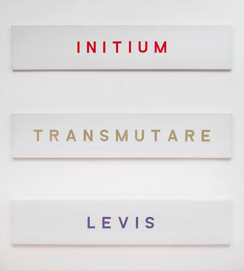 Triptih Ante Jerković izrađen je 1990, a fotografirao ga je Boris Cvjetanovic.